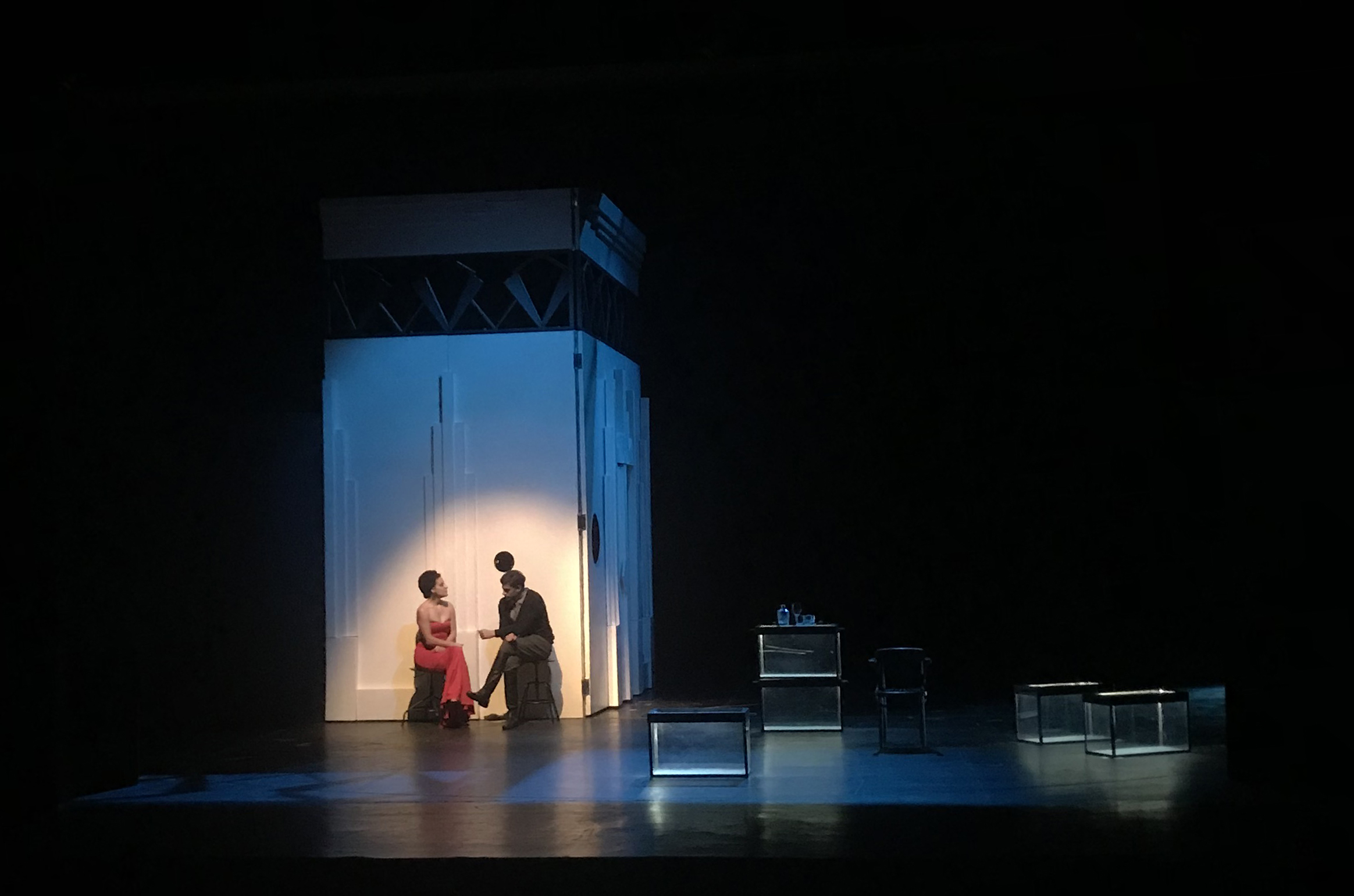 Predstava Roma o Londonu - Beogradsko dramsko pozorište